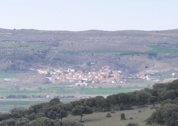 Panorámica de Salobral, Muñopepe y La Serrada en el valle de Amblés desde la sierra de Yemas, Provincia de Ávila, España.